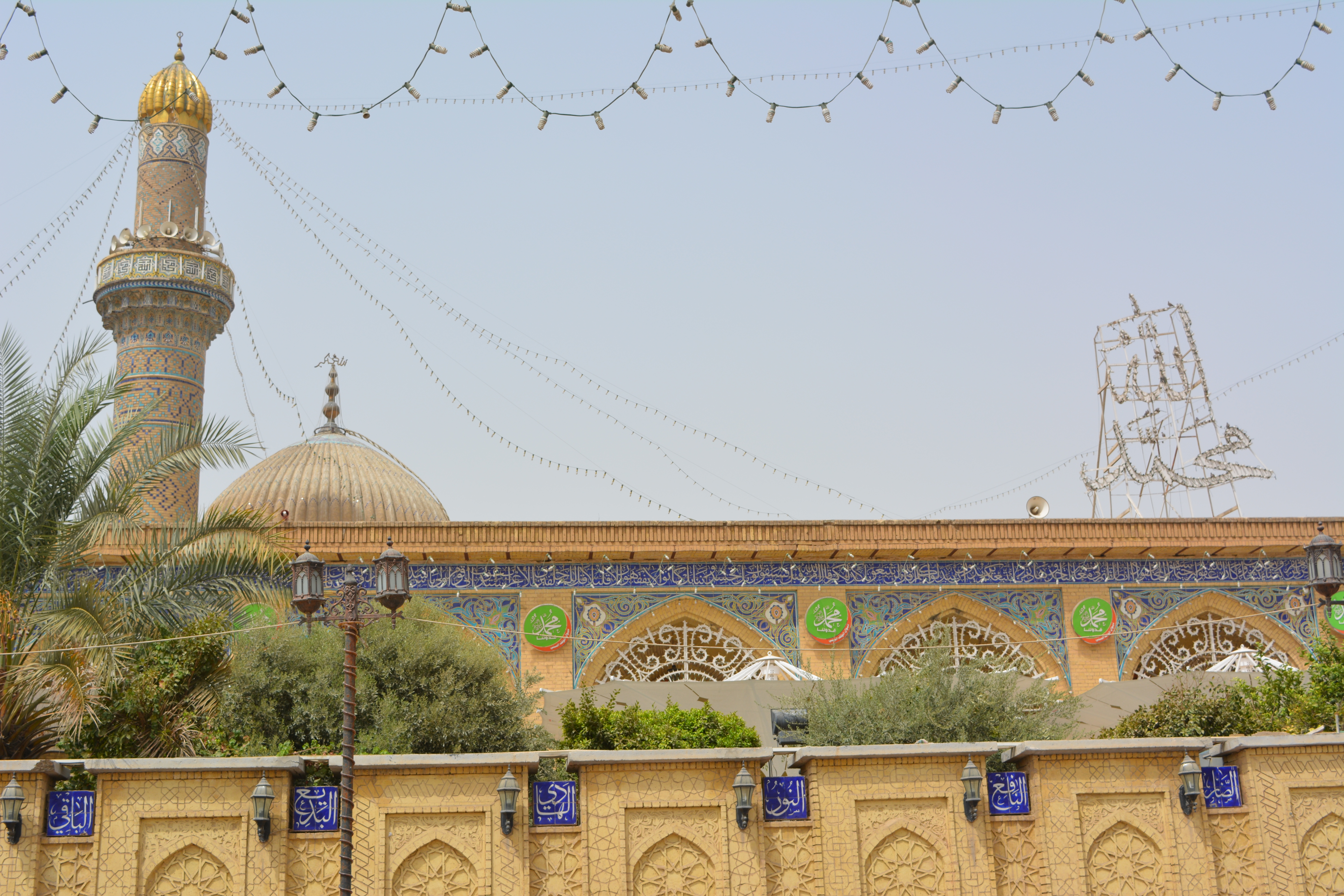 جامع ومرقد الامام ابو حنيفة النعمان في حي الأعظمية ببغداد